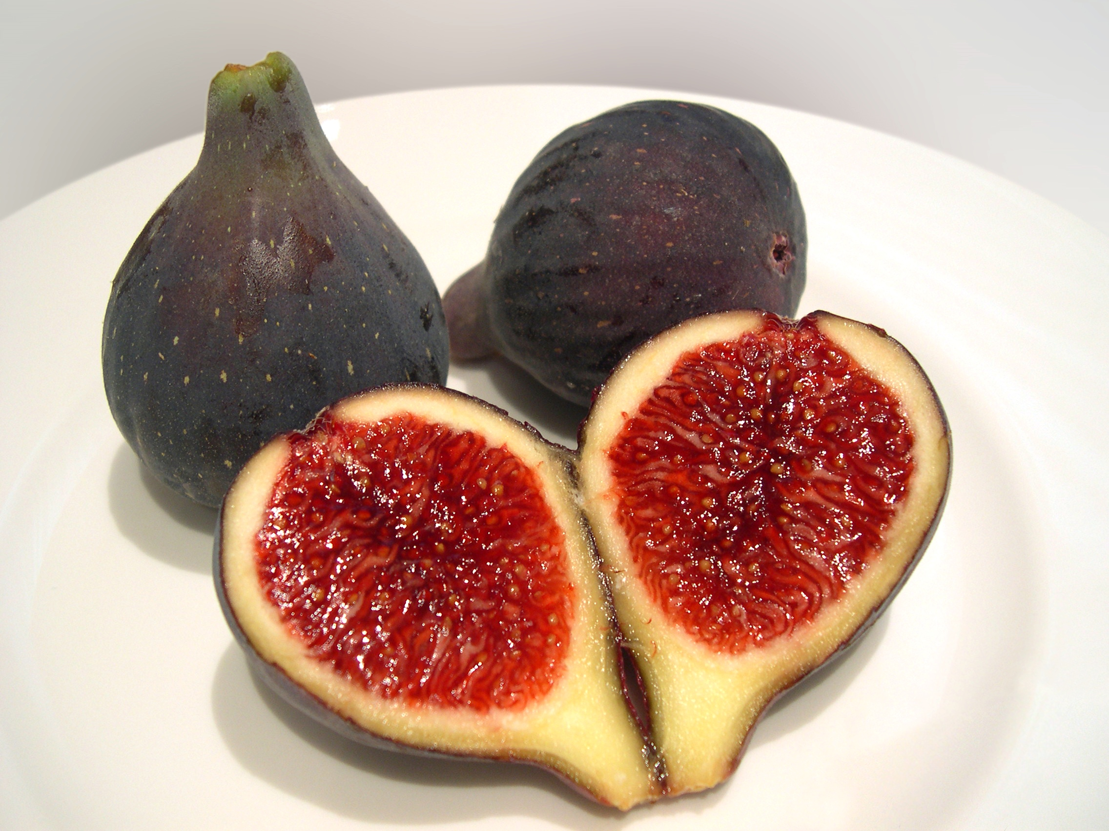 Breva (higo)